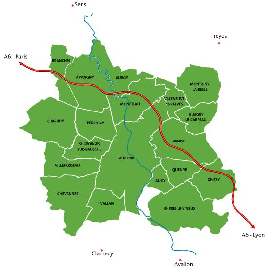 Carte des communes de la CA